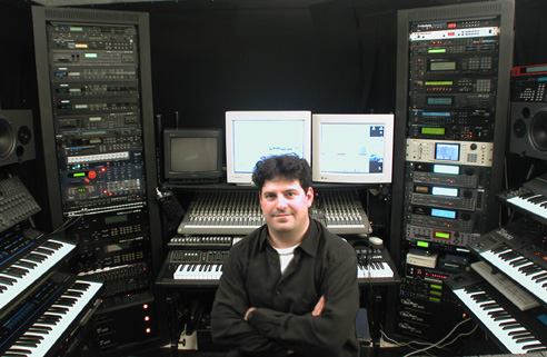 Costa Kotselas in studio Los Angeles, CA